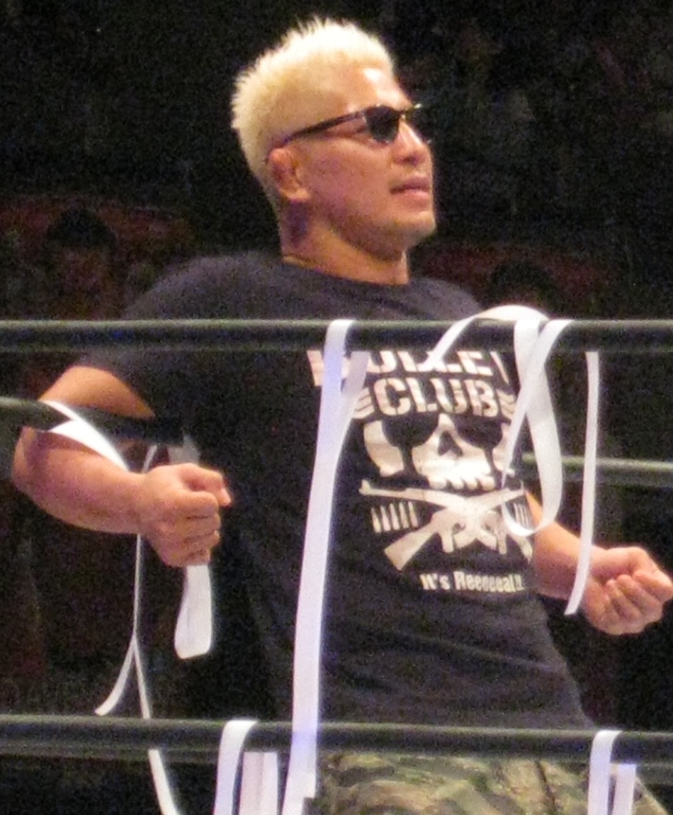 2014年6月21日 大阪府立体育会館 「DOMINION6.21」 高橋裕二郎